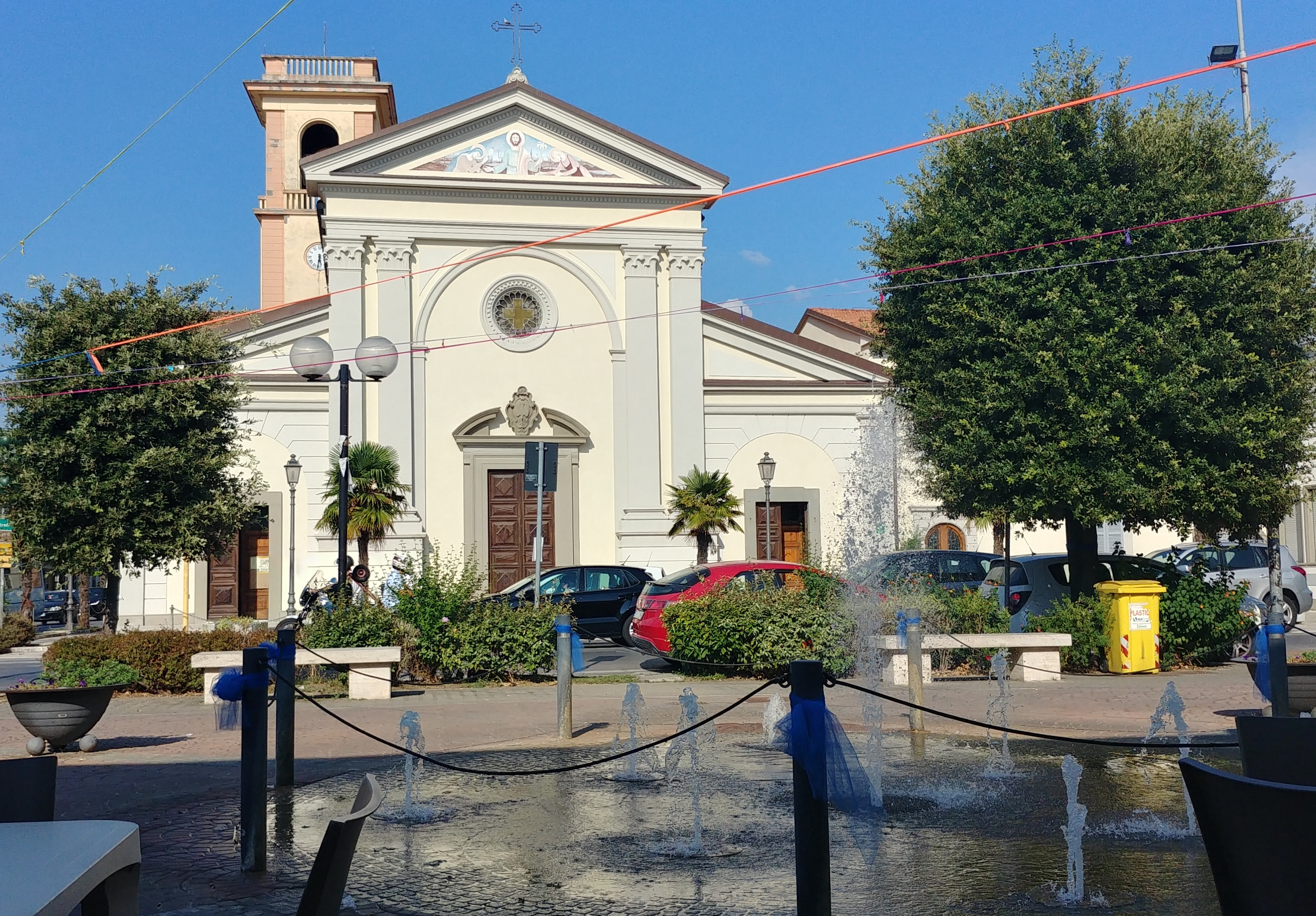 La chiesa di Torre del Lago, vista dalla piazza